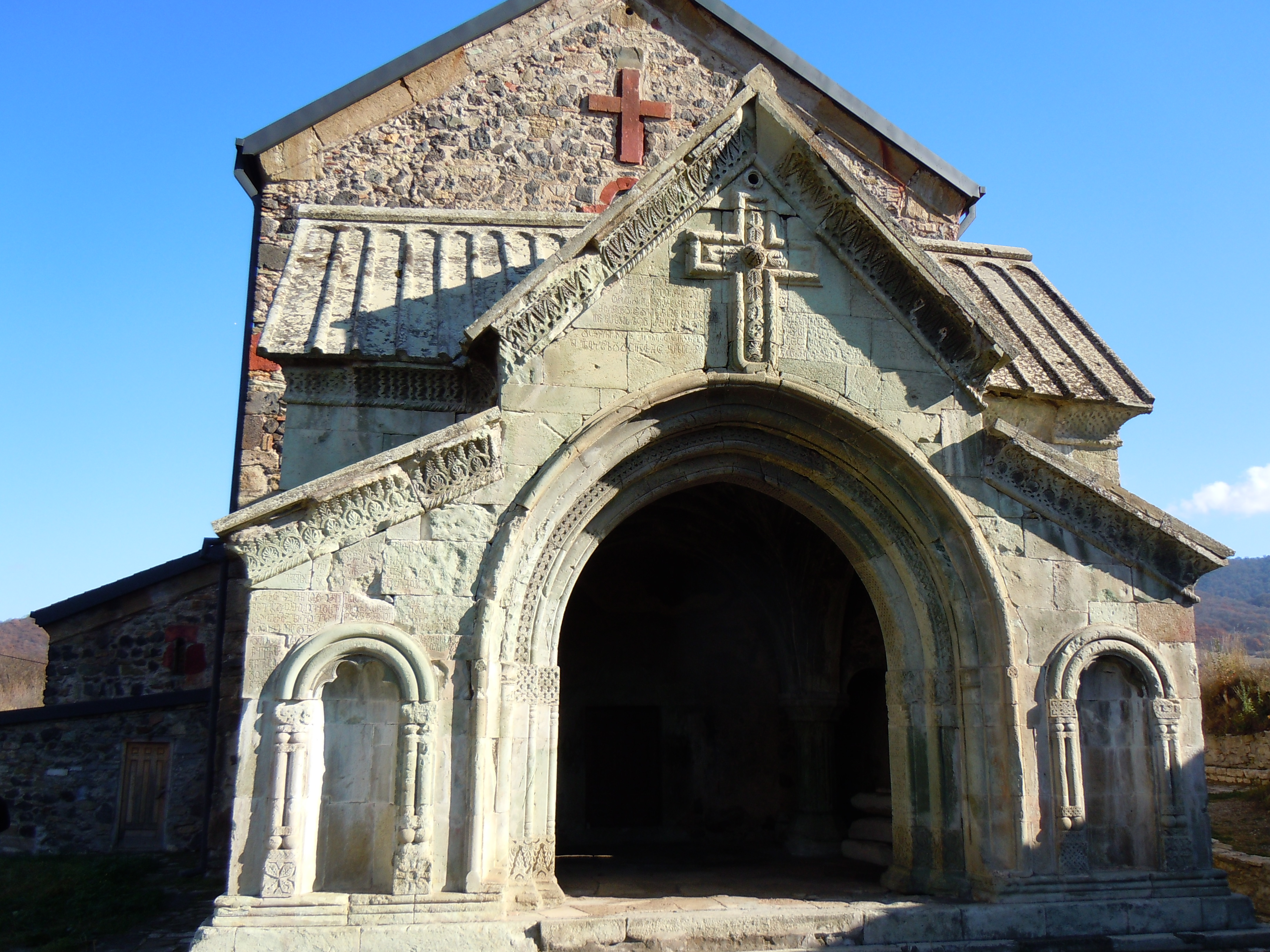 დმანისის ეზოს ეკლესია